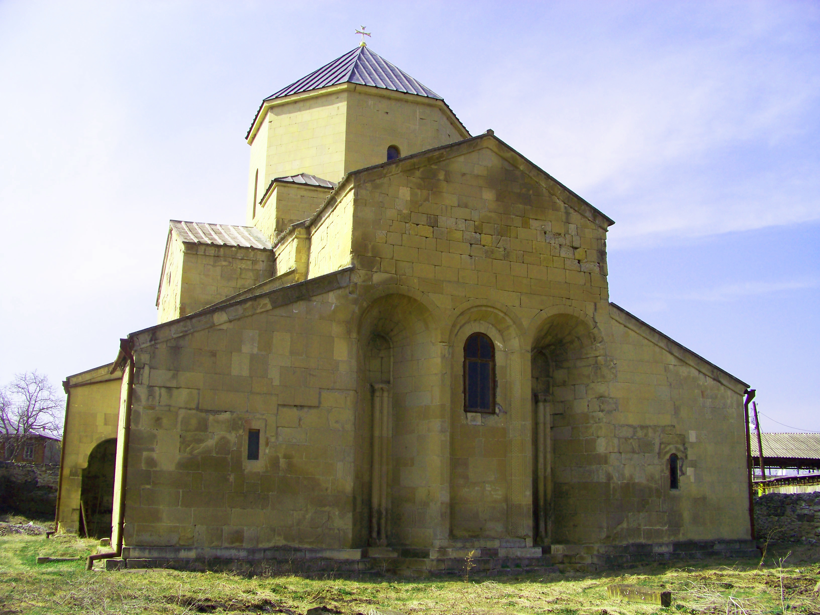 წრომის ტაძარი